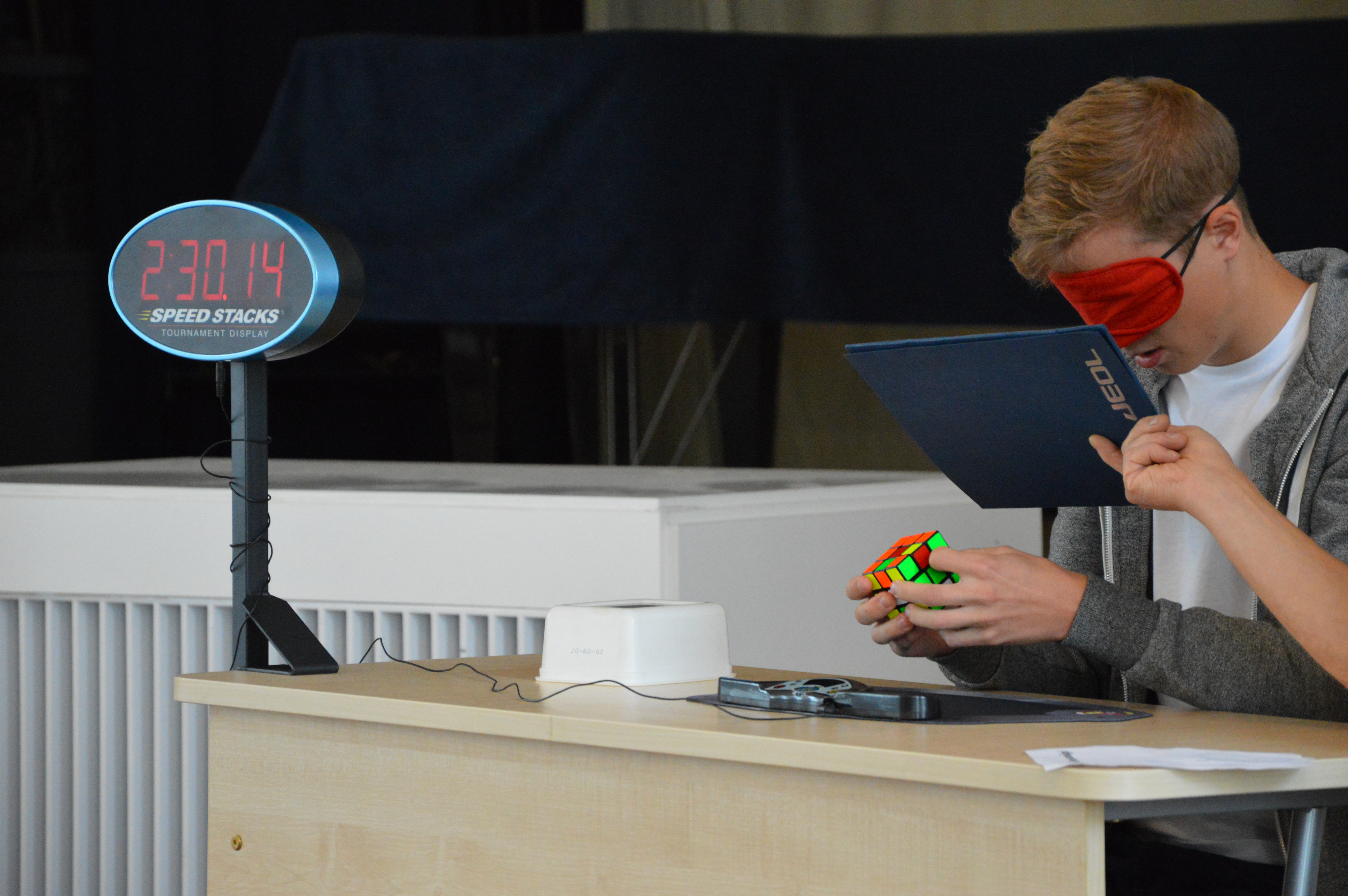 Rubiku kuubiku kinnisilmi lahendamine võistlusel Estonian Open 2016.